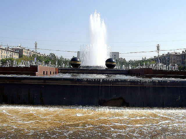 Каскадная площадь (площадь фонтанов) г. Караганда